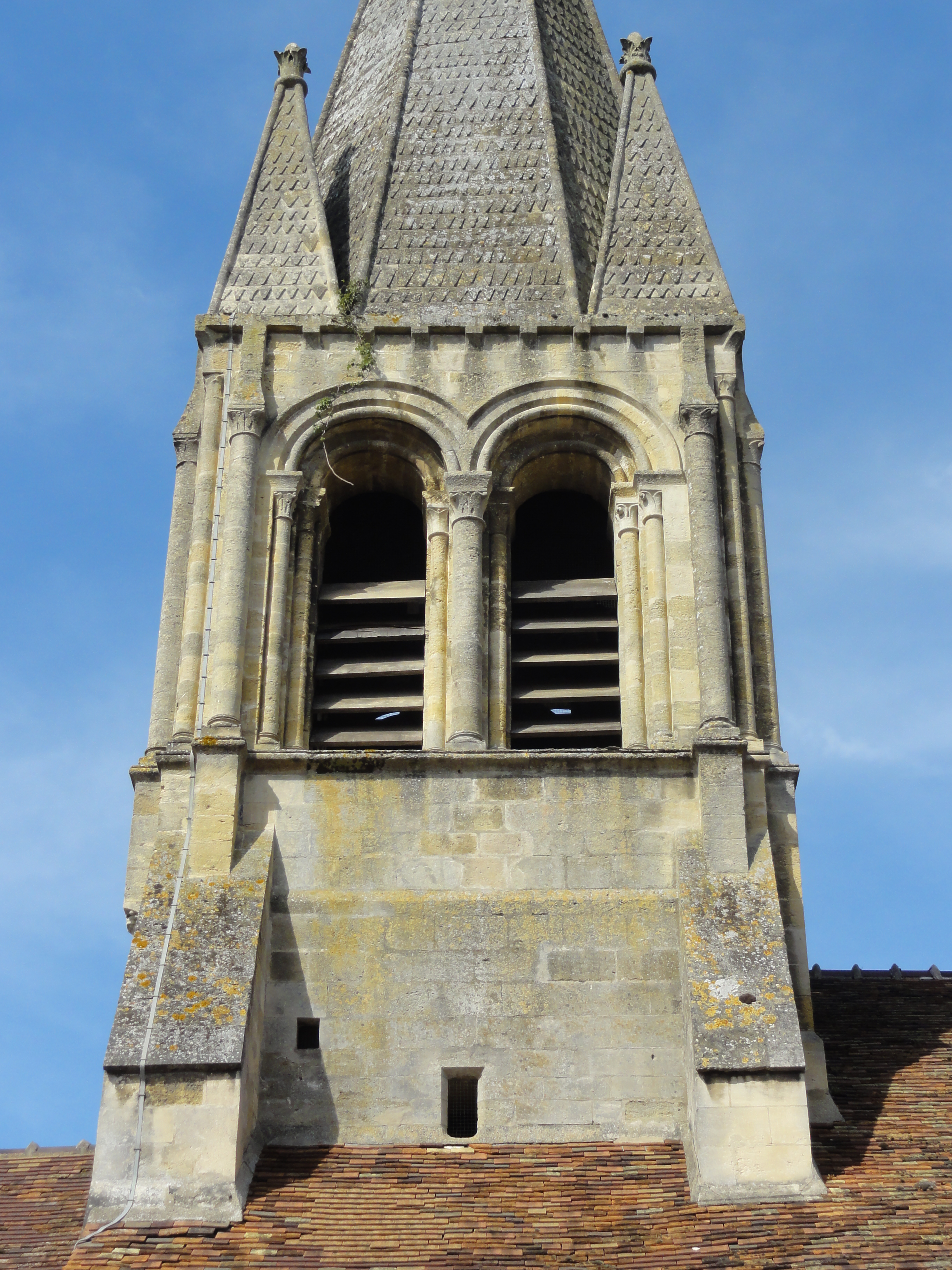 Église Saint-Germain-de-Paris de Hardricourt - voir titre.